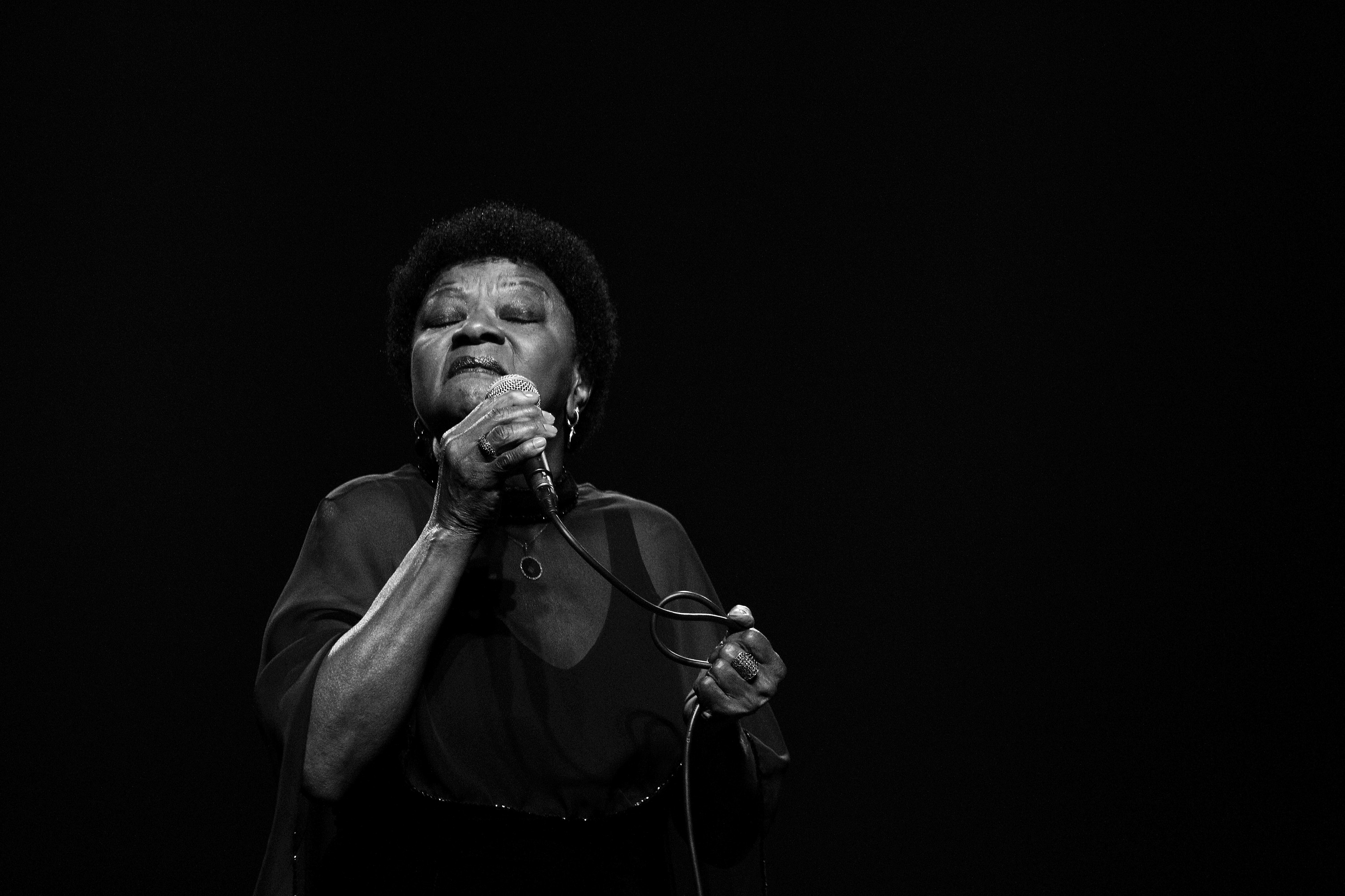 ©2011 Jardiel Carvalho - Todos os direitos reservados é proibido qualquer tipo de reprodução das imagens sem autorização. Imagem protegida pela Lei do Direito Autoral Nº 9.610 de 19/02/1998.